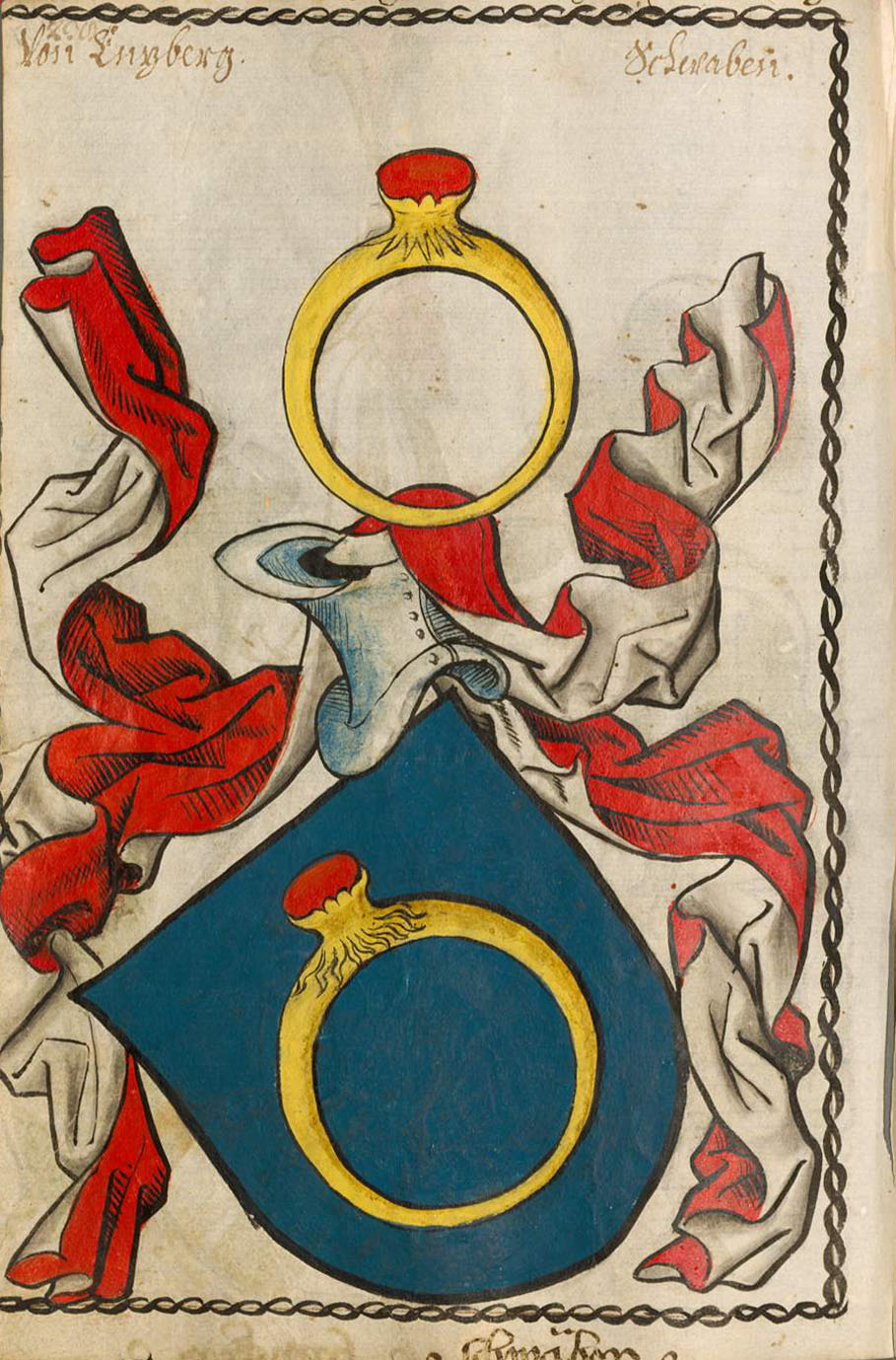 Scheibler'sches Wappenbuch, älterer Teil Enzberg